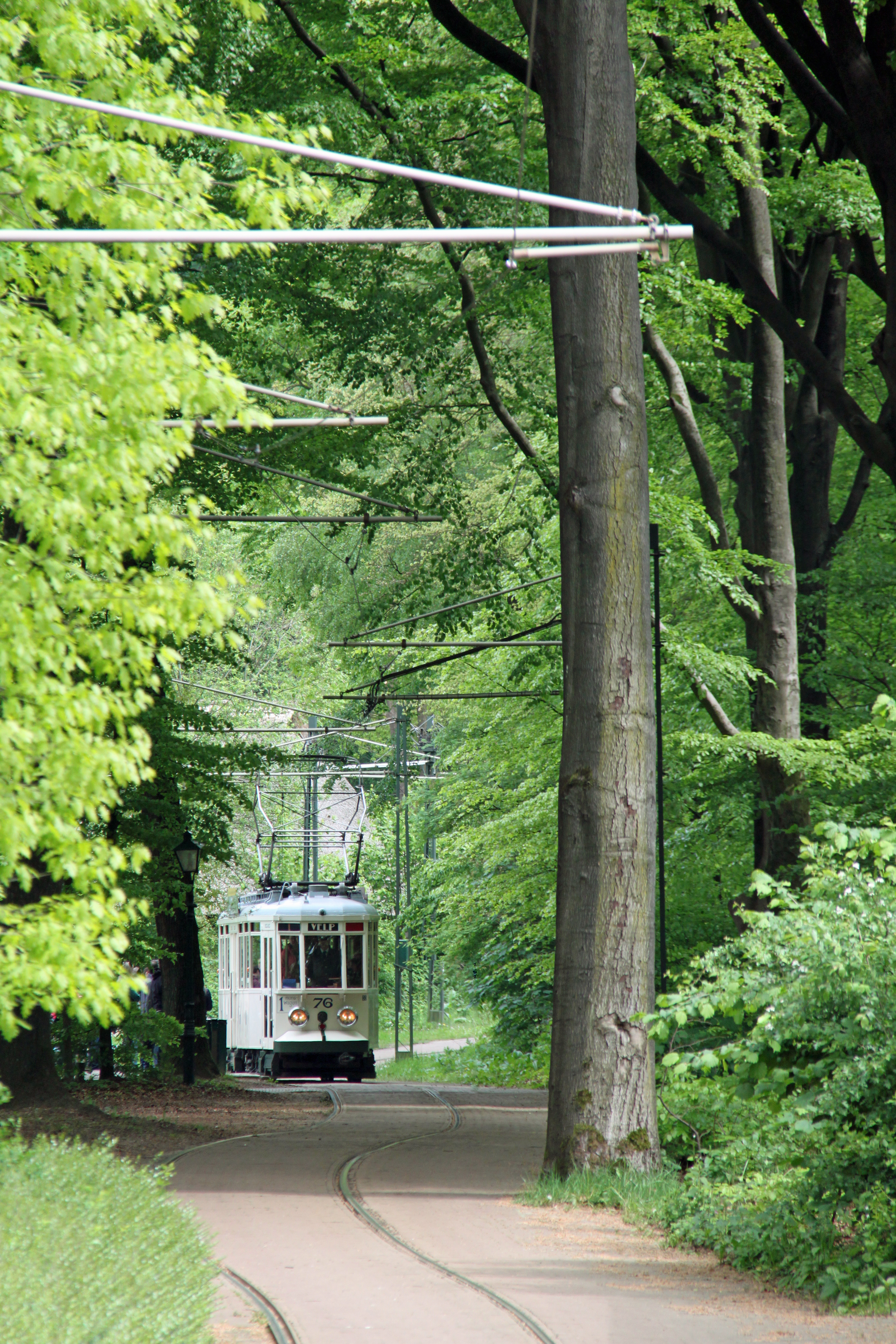 In het Nederlands Openluchtmuseum in Arnhem bestaat sinds 1996 een elektrisch trambedrijf.